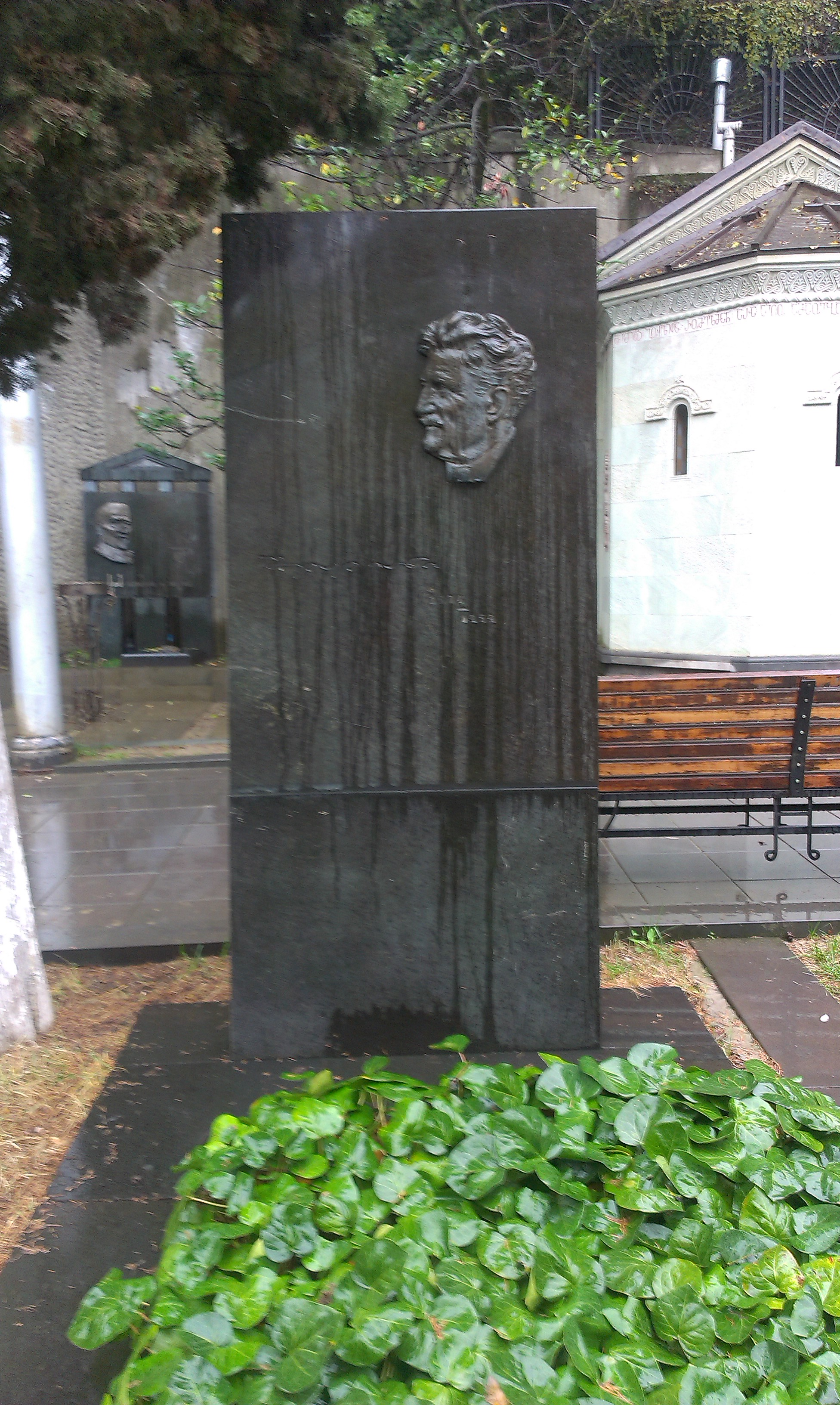 Пантеон Мтацминда